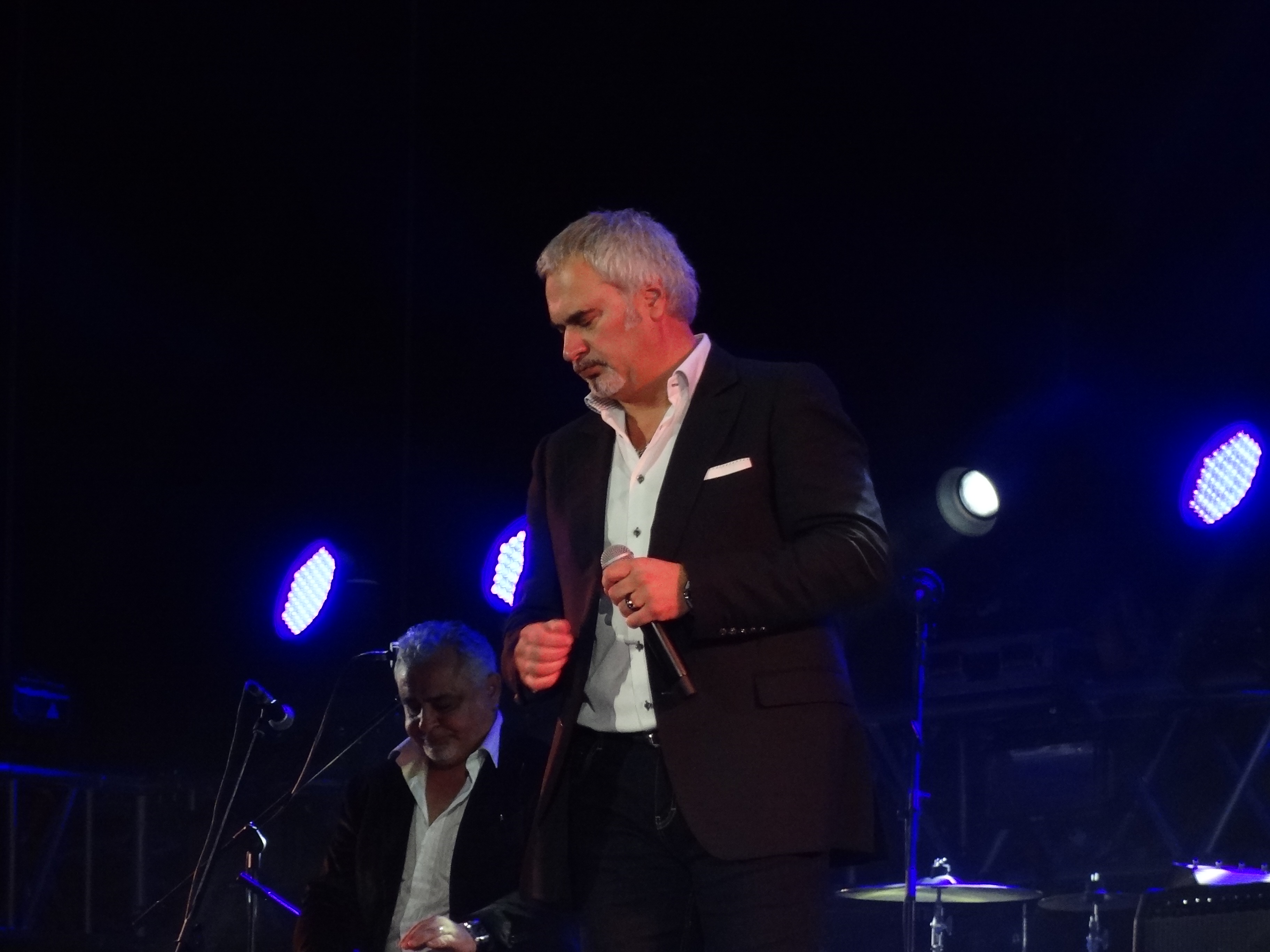 Валерий Меладзе. Концерт в рамках культурной программы Международного Инвестиционного Форума «Сочи-2012»